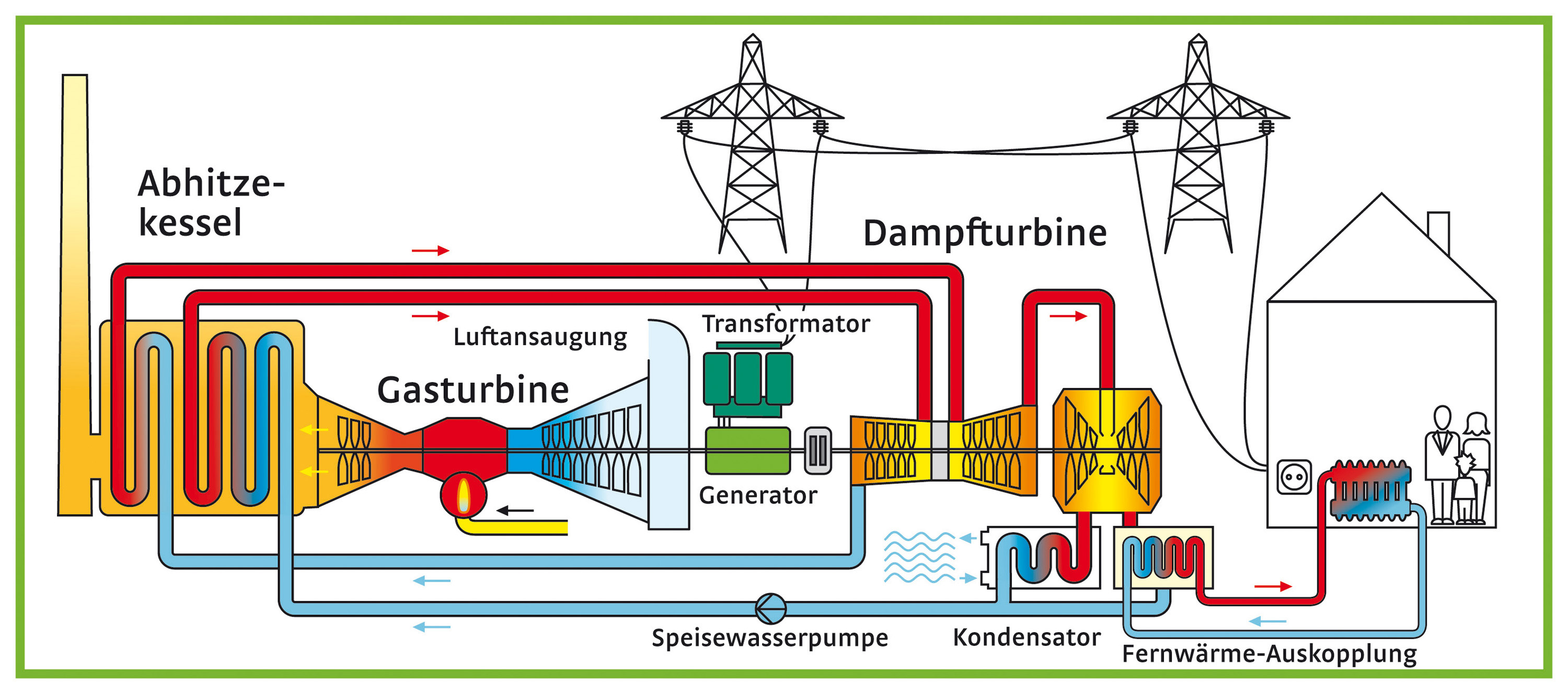 Energieflussdiagramm der Einwellenanlage im GuD-Kraftwerk Lausward